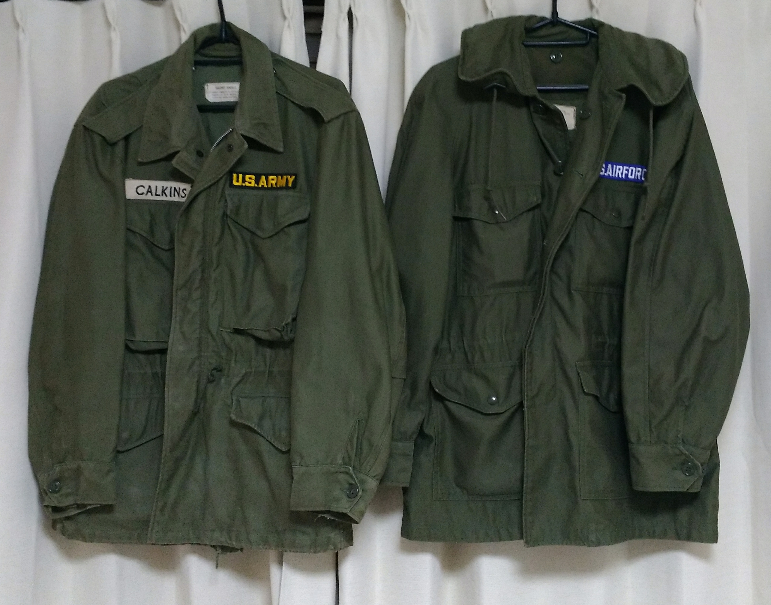 M51フィールドジャケットとUSAFフィールドジャケット（キャトルジャケット）